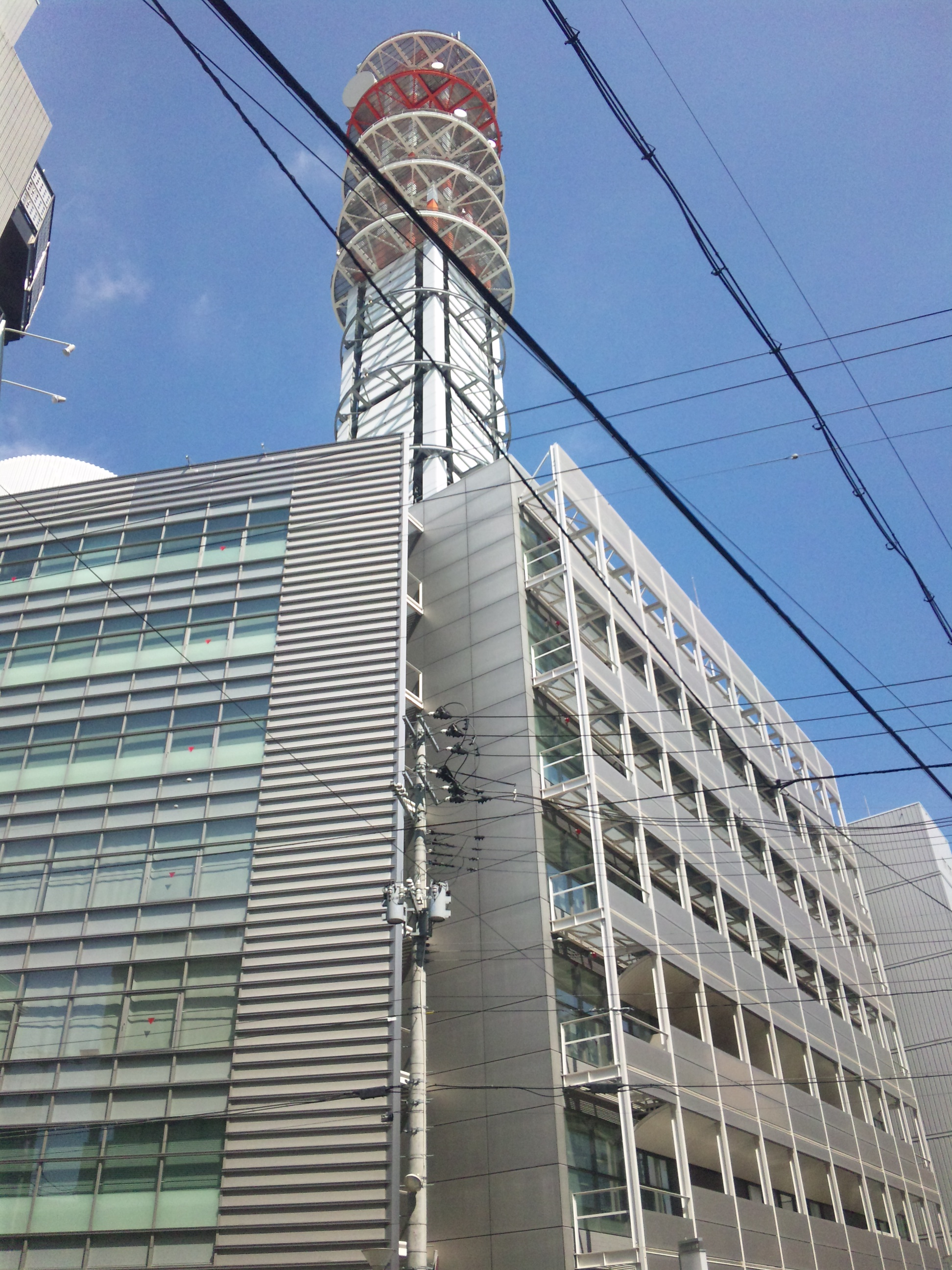 ドコモ仙台ビル